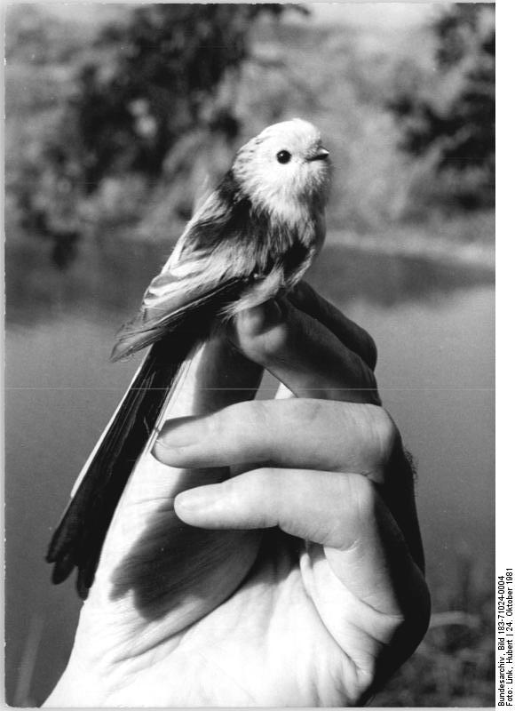 Schwanzmeise ADN-ZB Link 24.10.1981 Bezirk Magdeburg: Schutz und Hege der Vögel - Zur Umwelt des Menschen gehören Vögel, auch die am Registrierplatz im "Naturschutzgebiert Steckby-Lödderitzer Forst" zur Beringung gefangene Schwanzmeise (Foto), ein typischer Brutvogel des Auenwaldes. Etwa 100 Vogelarten finden im Biosphären-Reservat ein geeignetes Rat- und Überwinterungsgebiet. Von der Arbeitsgruppe Biologische Station in Steckby des Instituts für Landschaftsforschung und Naturschutz der Akademie der Landwirtschaftswissenschaften werden in Zusammenarbeit mit der Beringungszentrale der DDR, der Vogelwarte Hiddensee der Ernt-Moritz-Arndt-Univerisät Greifswald und vielen ehrenamtlichen Mitarbeiern ethnologische Forschungen durchgeführt. Der Arbeitsgruppe obliegt zugleich die Ausbildung ehrenamtlicher Beringer. Neben der Klärung des Vogelzuges werden mit Hilfe der Beringung das Artenspektrum der Vogelwelt und ihre ökologische Bindung, Bestandsgröße, Altersstruktur und Dynamik der Vogelpopulationen erforscht. Die gewonnenen wissenschaftlchen Grundlagen dienen der Erhaltung der Mannifaltigkeit der heimischen Tierwelt, dem Schutz vom Aussterben bedrohter Vogelarten, sowie der Gestaltung einer erholungswirksamen Umwelt des Menschen im Sinne der Natur- und Umweltgesetzgebung der DDR.